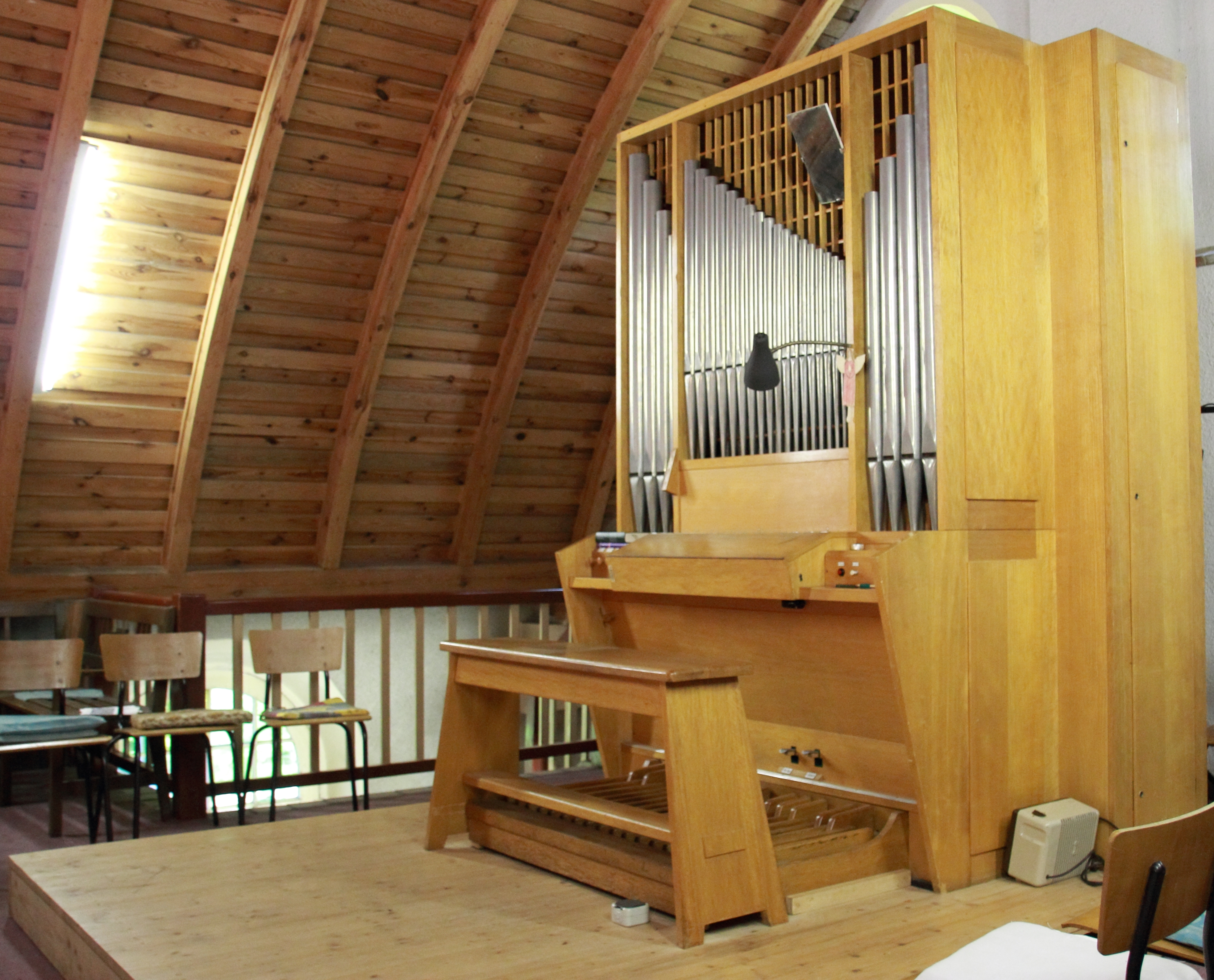 Dorfkirche Borgsdorf Hohen-Neuendorf Schuke-Orgel